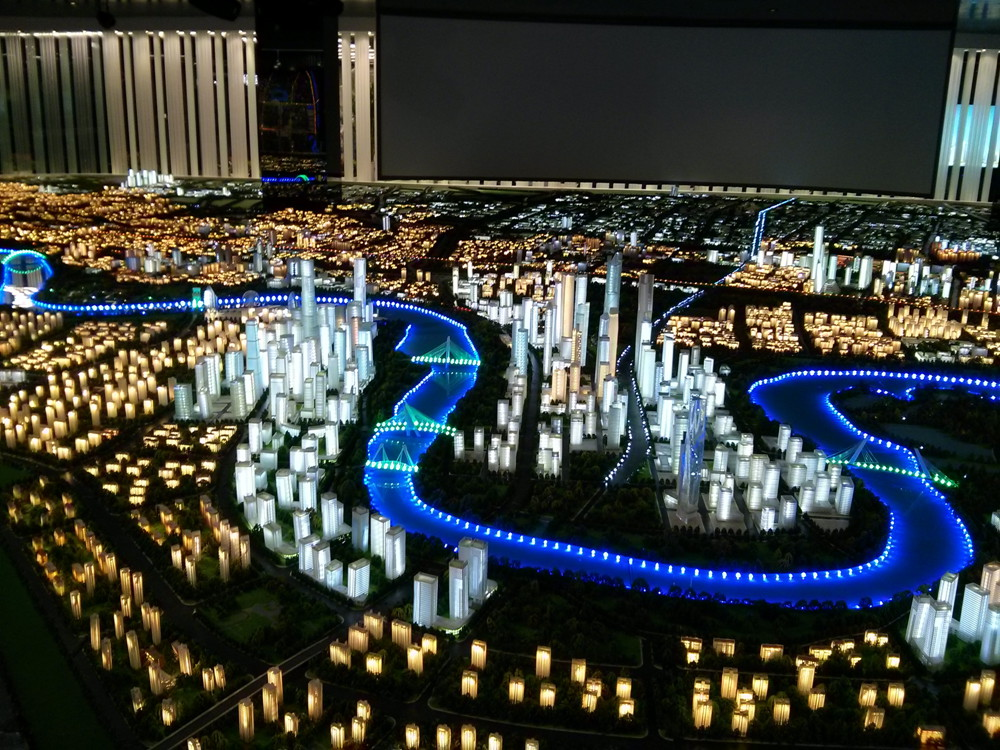 天津滨海新区核心区规划沙盘